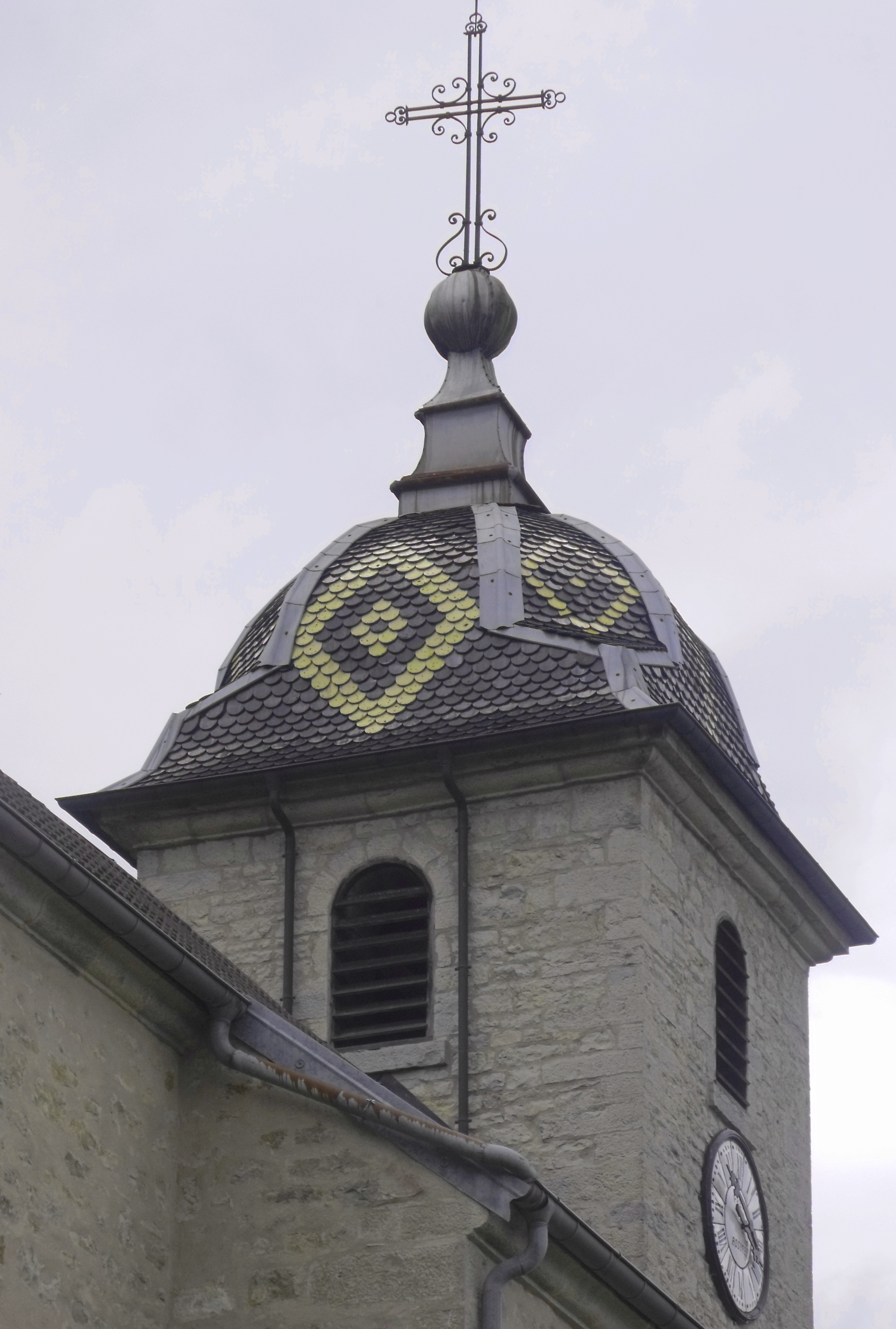 Détail clocher église de Saint-Georges-Armont, Doubs, France